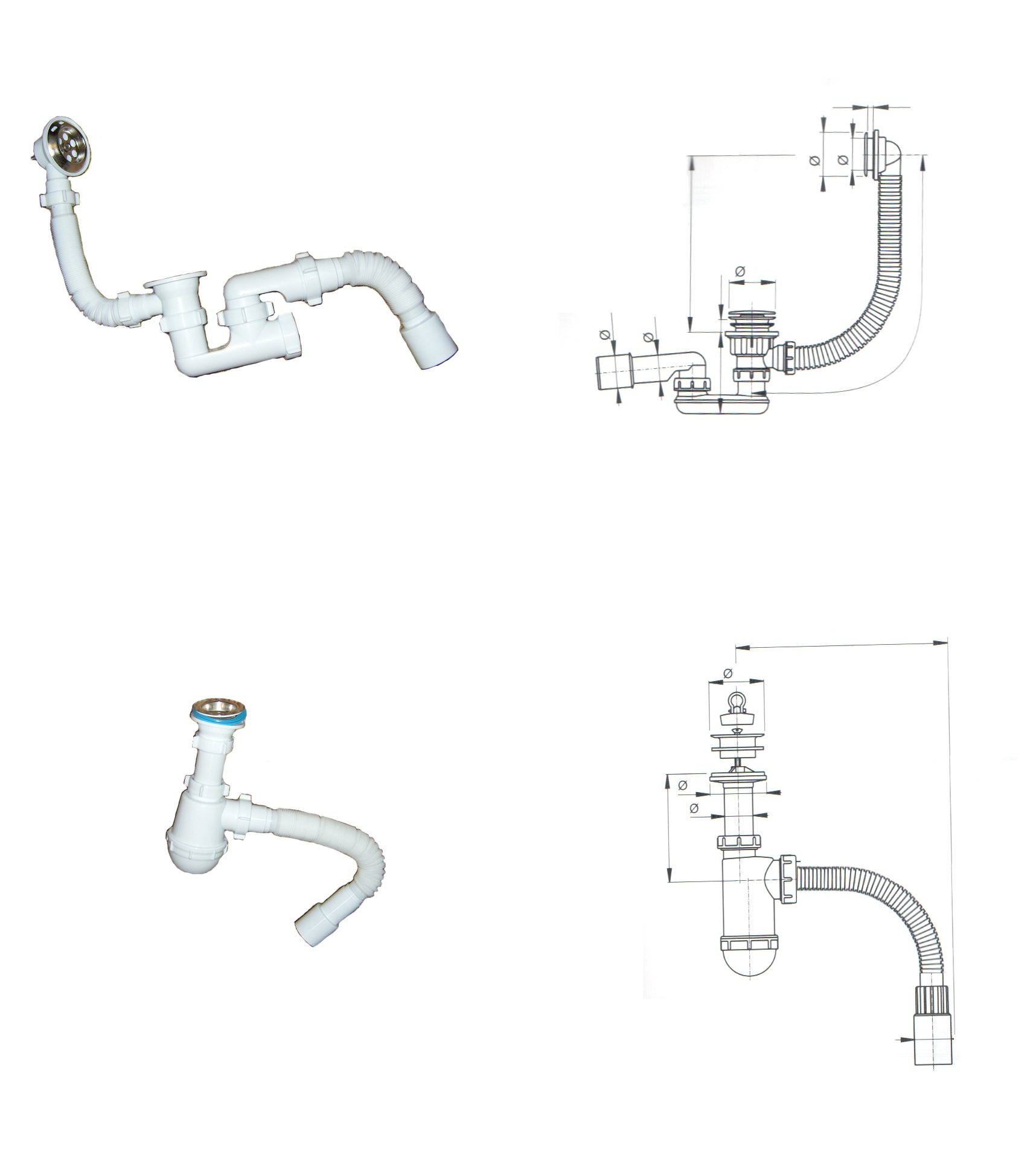 Сифоны сливные для санфаянса.